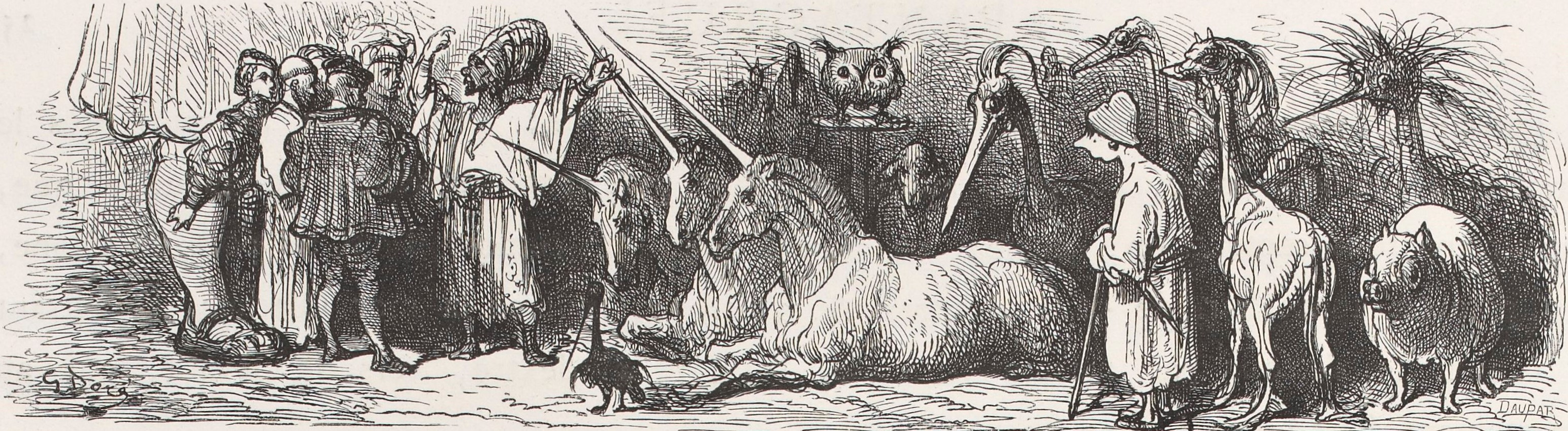 Les personnages du roman découvrent des marchandises exotiques et merveilleuses. Illustrations du Quart Livre de Gustave Doré en 1873, éditions Garnier Frères